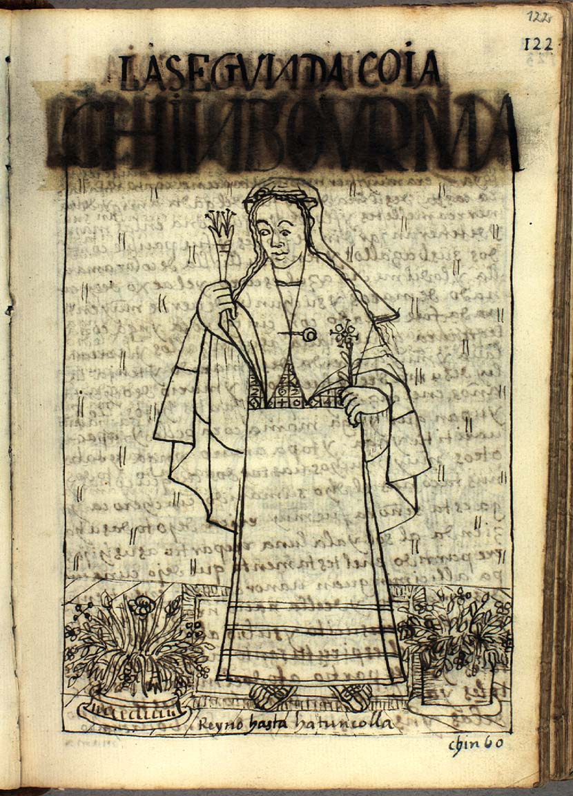 Chinbo Urma. Grabado de Huaman Poma de Ayala